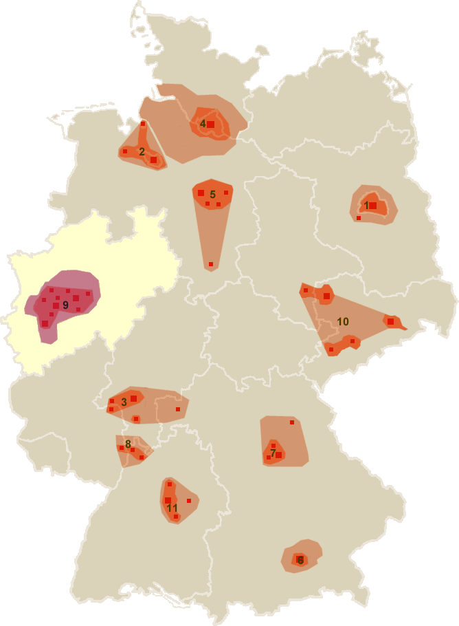 basierend auf Bild:Deutschland_Metropolregionen.png